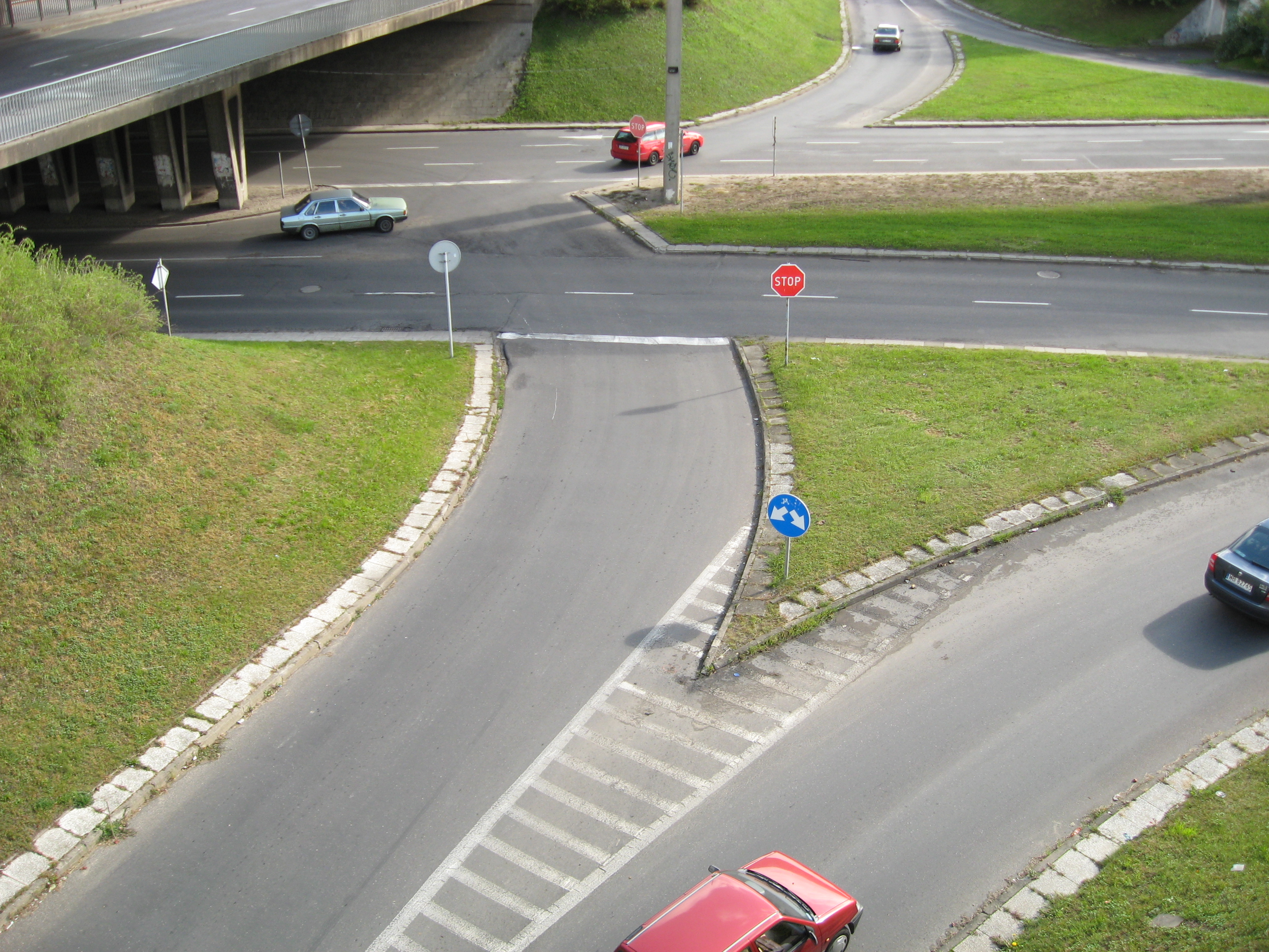 Skrzyżowanie wielopoziomowe; znaki STOP